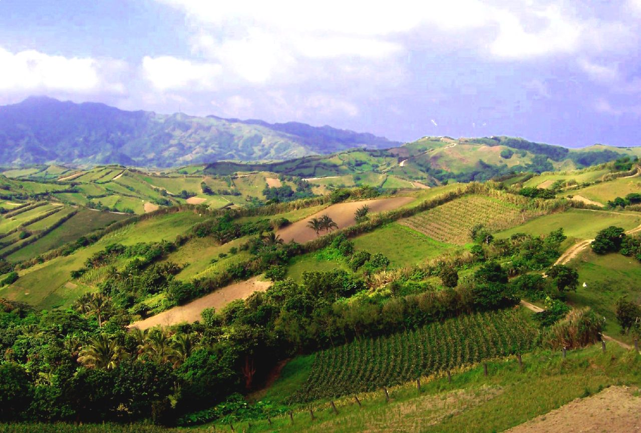 Hills in Batanes, Philippines